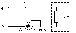 Dessin perso représentant le schéma du cablâge d'un wattmètre au bornes d'un dipôle monophasé